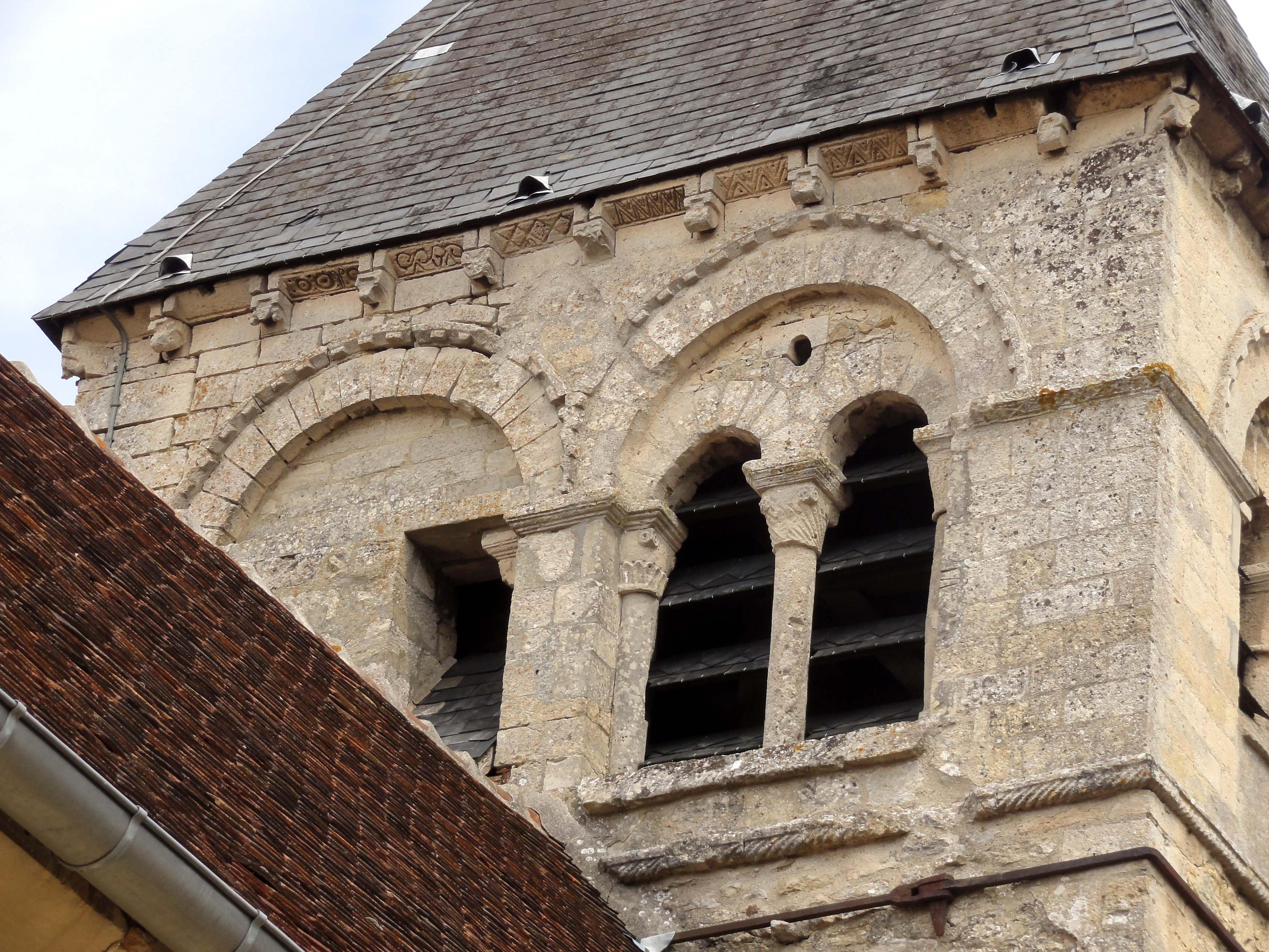 Église Saint-Michel-et-Saint-Vaast de Catenoy (voir titre).